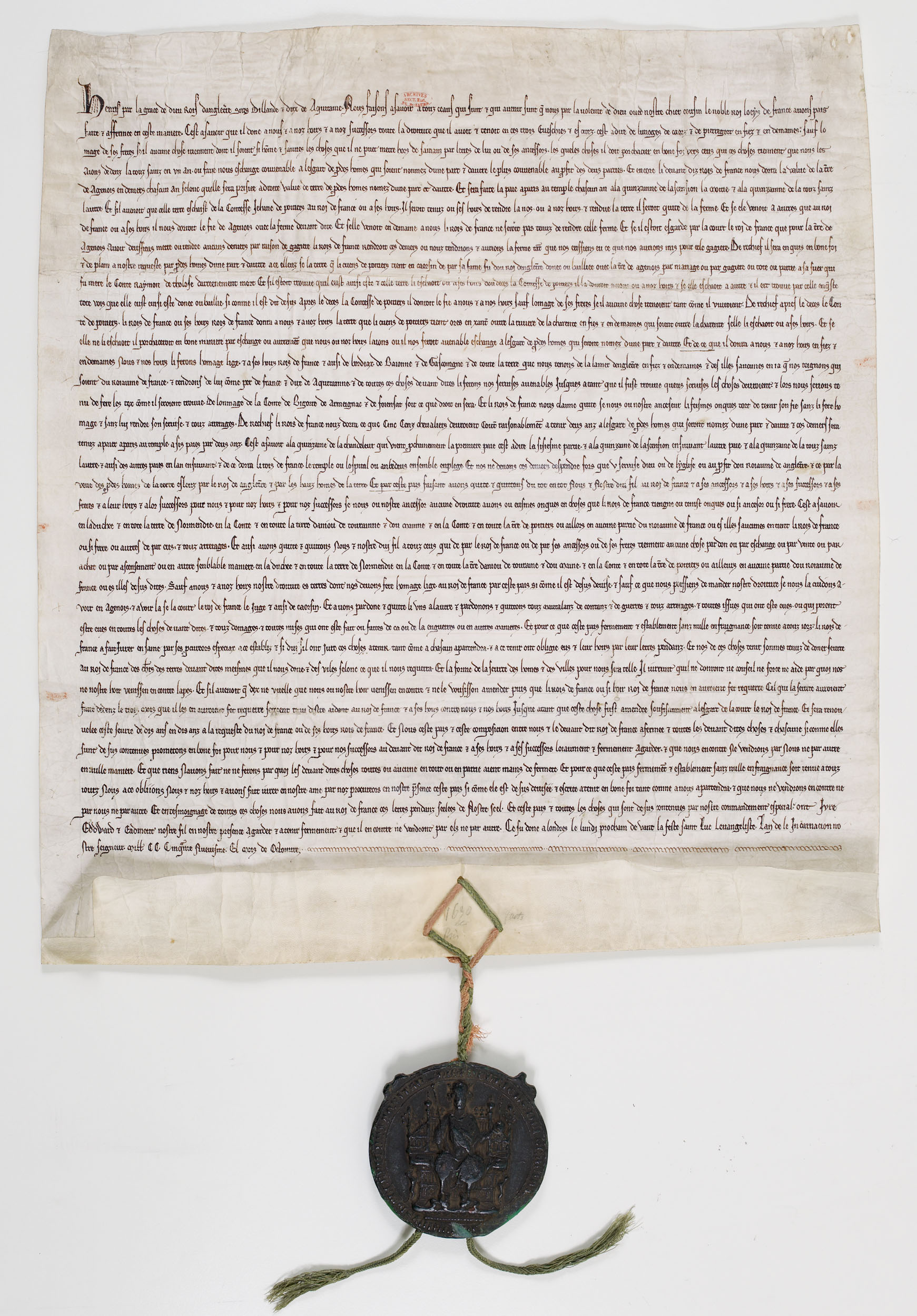 Traité de Paris conclu entre la France et l'Angleterre et ratifié à Londres le 13 octobre 1259 par Henri III, roi d'Angleterre, et Louis IX. Acte en français scellé du sceau de Henri III en cire verte sur cordonnets de soie rouge et verte.